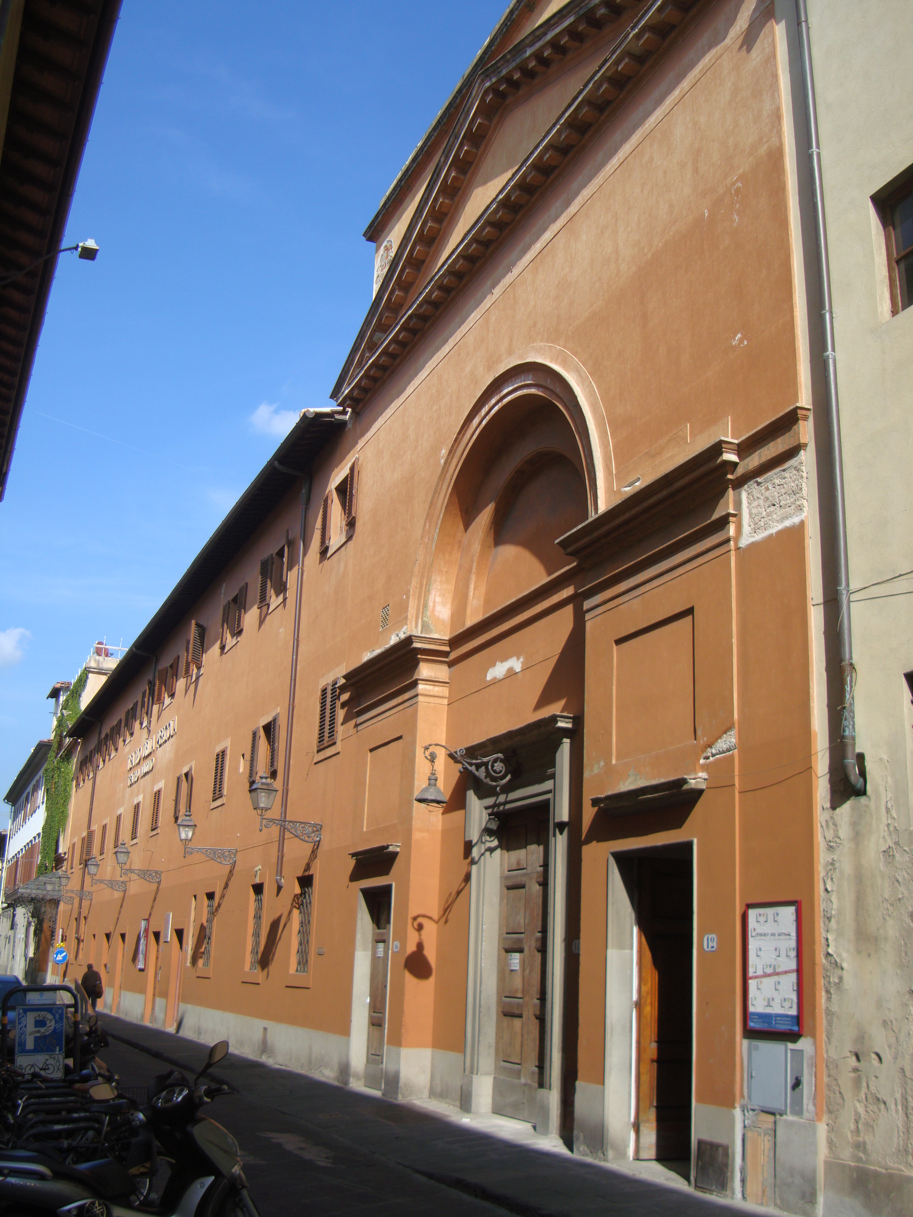 Teatro della Pergola, Firenze 10